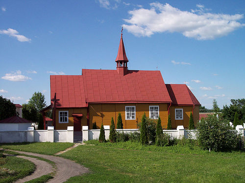 Kościół